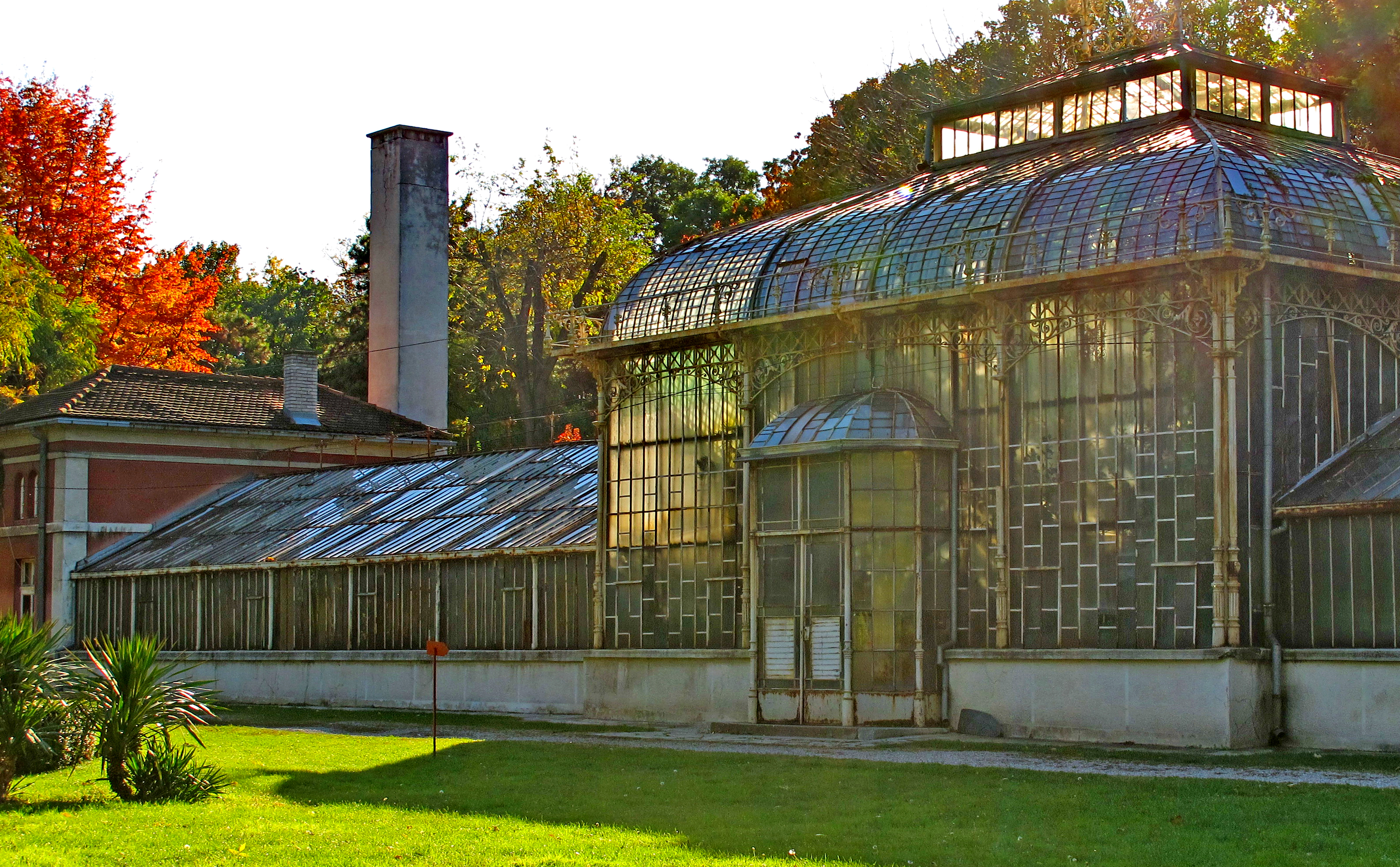 Ово је фотографија заштићеног природног добра у Србији под шифром: СП005This is a a photo of a natural area in Serbia with ID: СП005 Споменик природе Ботаничка башта Јевремовац